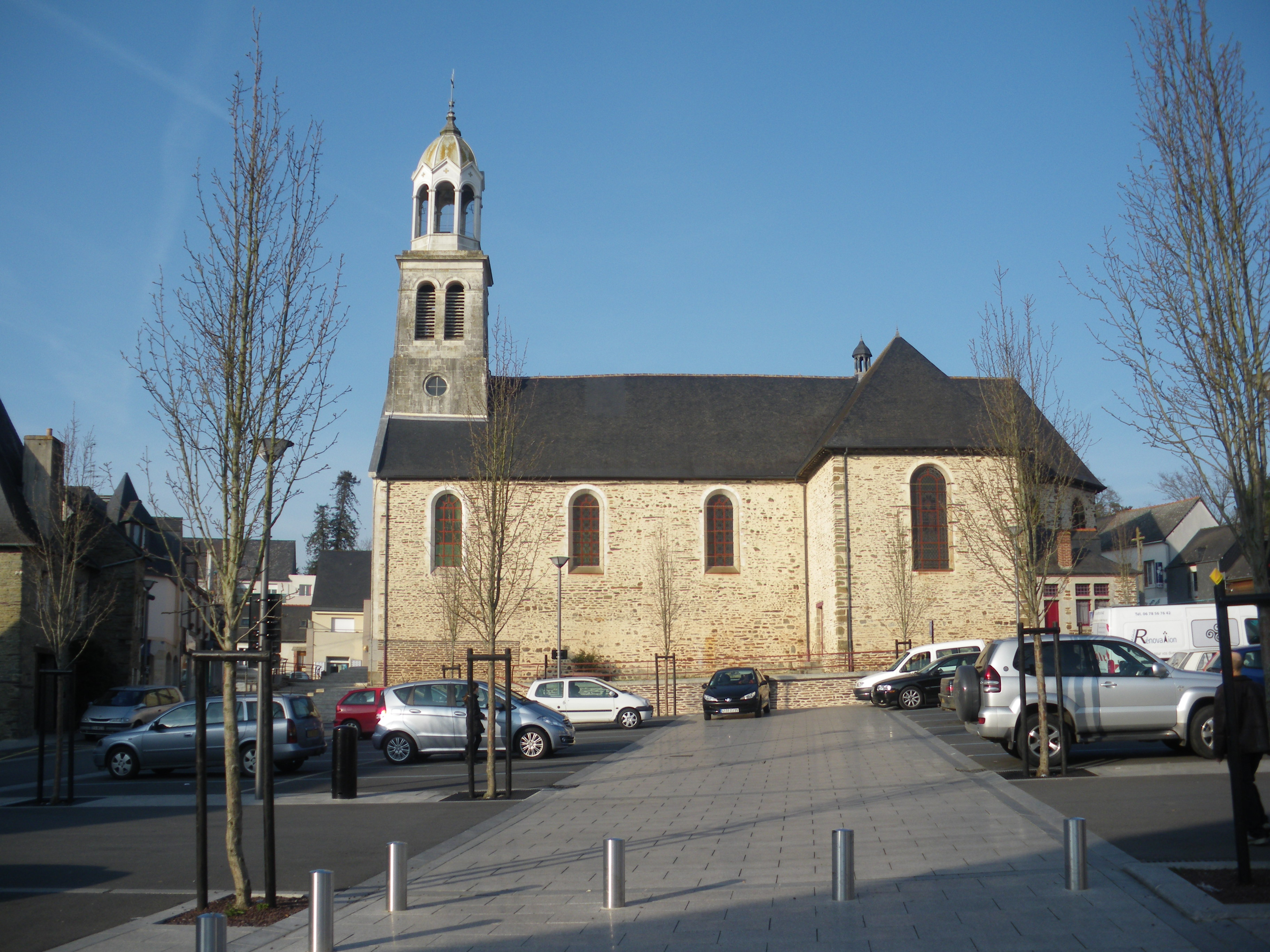 Place du marché de Vern avec en fond l'église St Martin.